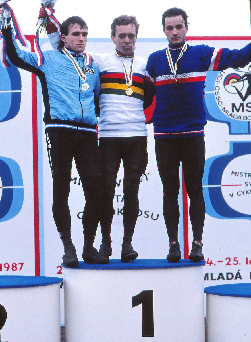 v.l.n.r. Danny de Bie (Belgien) - Weltmeister Klaus-Peter Thaler (Deutschland / Bund Deutscher Radfahrer) und Christoph Lavainne (Frankreich) - Profis - Rad-Querfeldein-Weltmeisterschaft 1987 in Mlada Boleslav / Tschechien